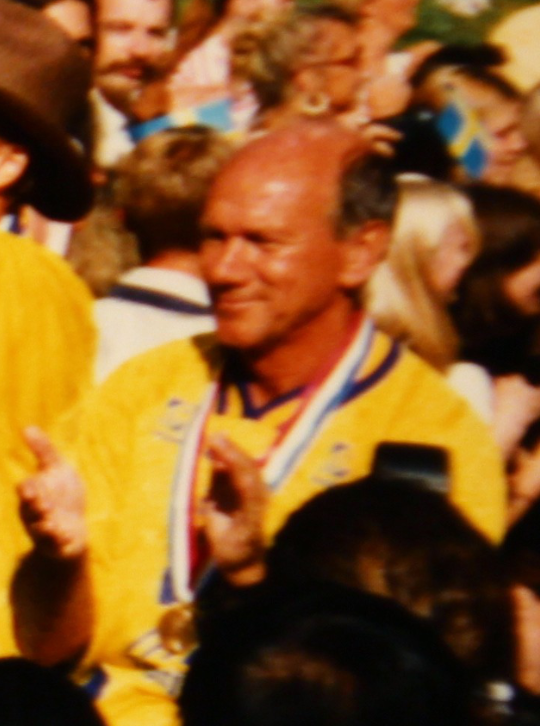 Tommy Svensson en 1994